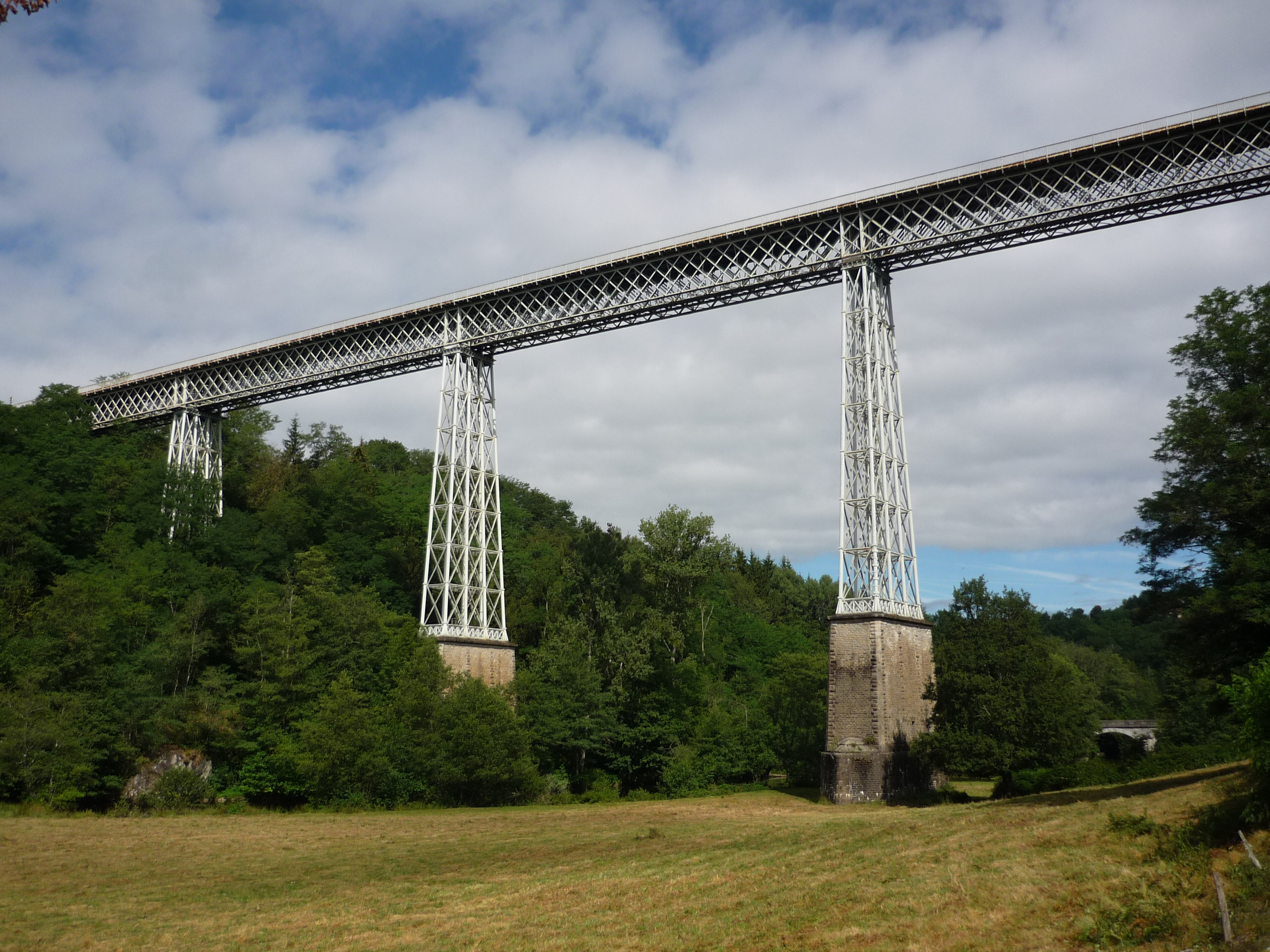 Viaduc ferroviaire de la ligne Busseau-sur-Creuse - Ussel traversant la Creuse quelques kilomètres après le départ de la ligne, à hauteur de Busseau, hameau de la commune d'Ahun.